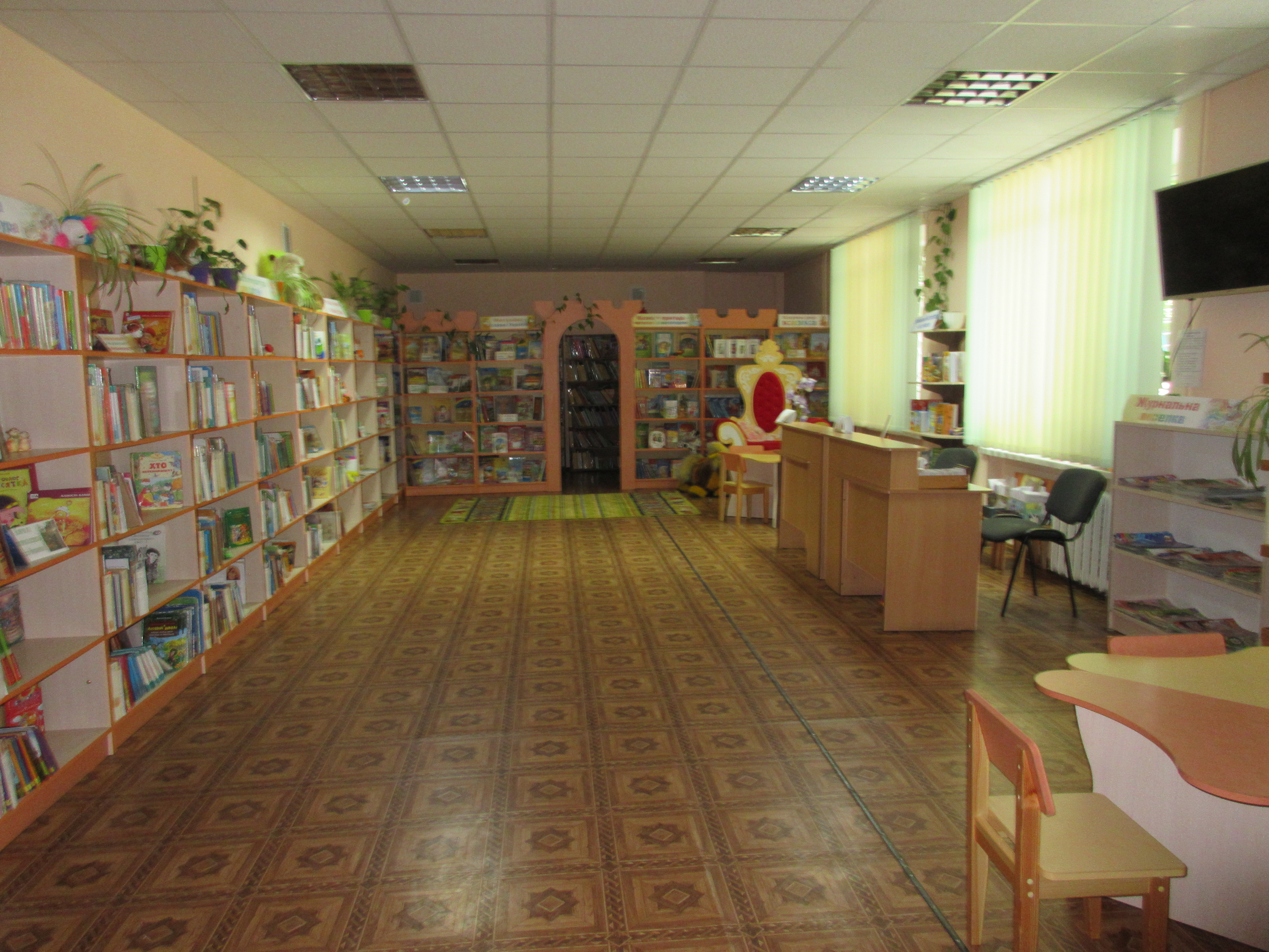 Фотознімок